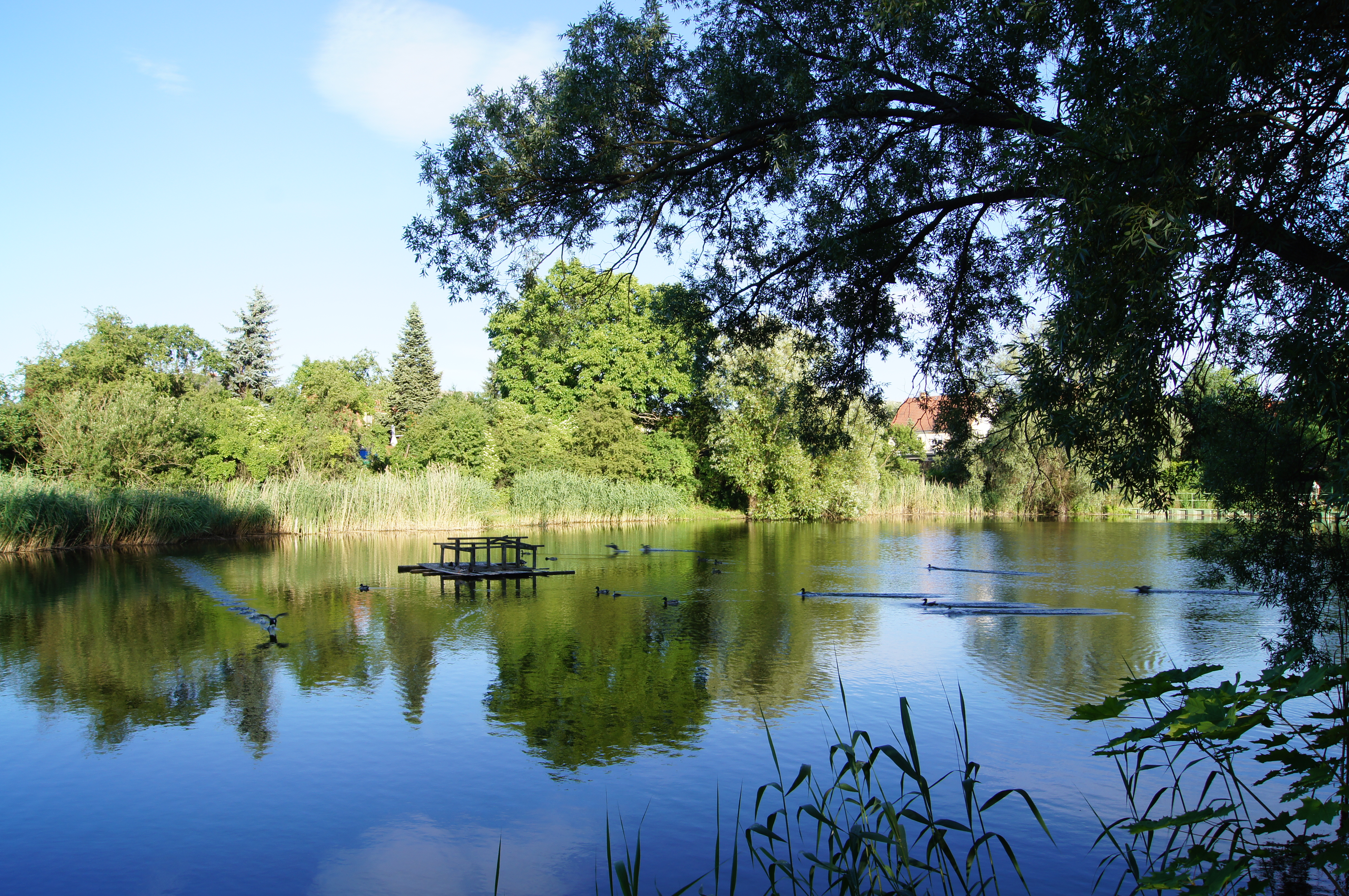 Lokbad Frankfurt (Oder), Deutschland